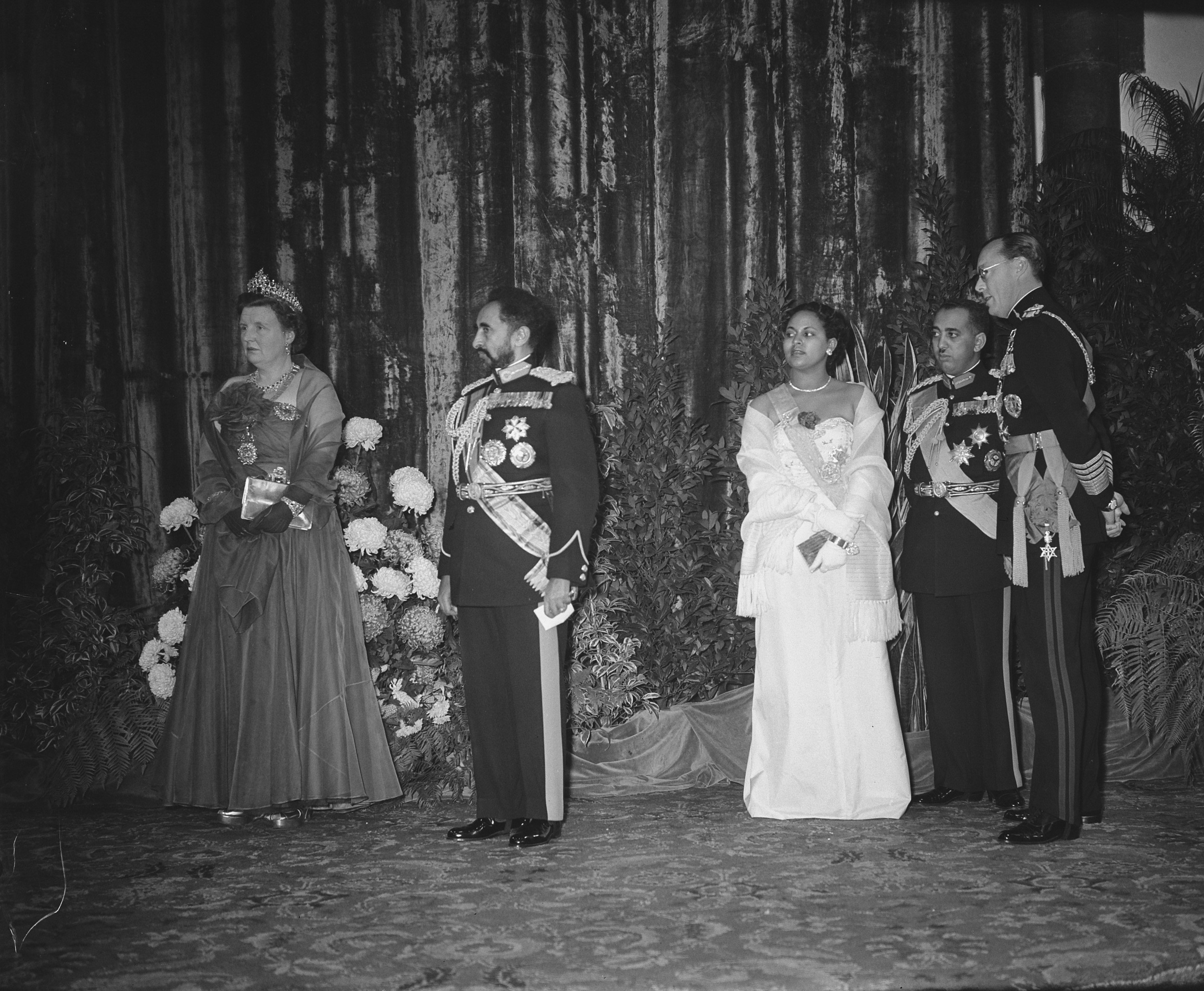 Collectie / Archief : Fotocollectie Anefo Beschrijving : Bezoek Keizer Selassie, tweede dag, ontvangst in de Ridderzaal Datum : 4 november 1954 Locatie : Den Haag, Zuid-Holland Trefwoorden : Ontvangsten, bezoeken Persoonsnaam : Haile Selassie, keizer van Ethiopië Instellingsnaam : Ridderzaal Fotograaf : Bilsen, Joop van / Anefo Auteursrechthebbende : Nationaal Archief Materiaalsoort : Glasnegatief Nummer archiefinventaris : bekijk toegang 2.24.01.09 Bestanddeelnummer : 906-8267